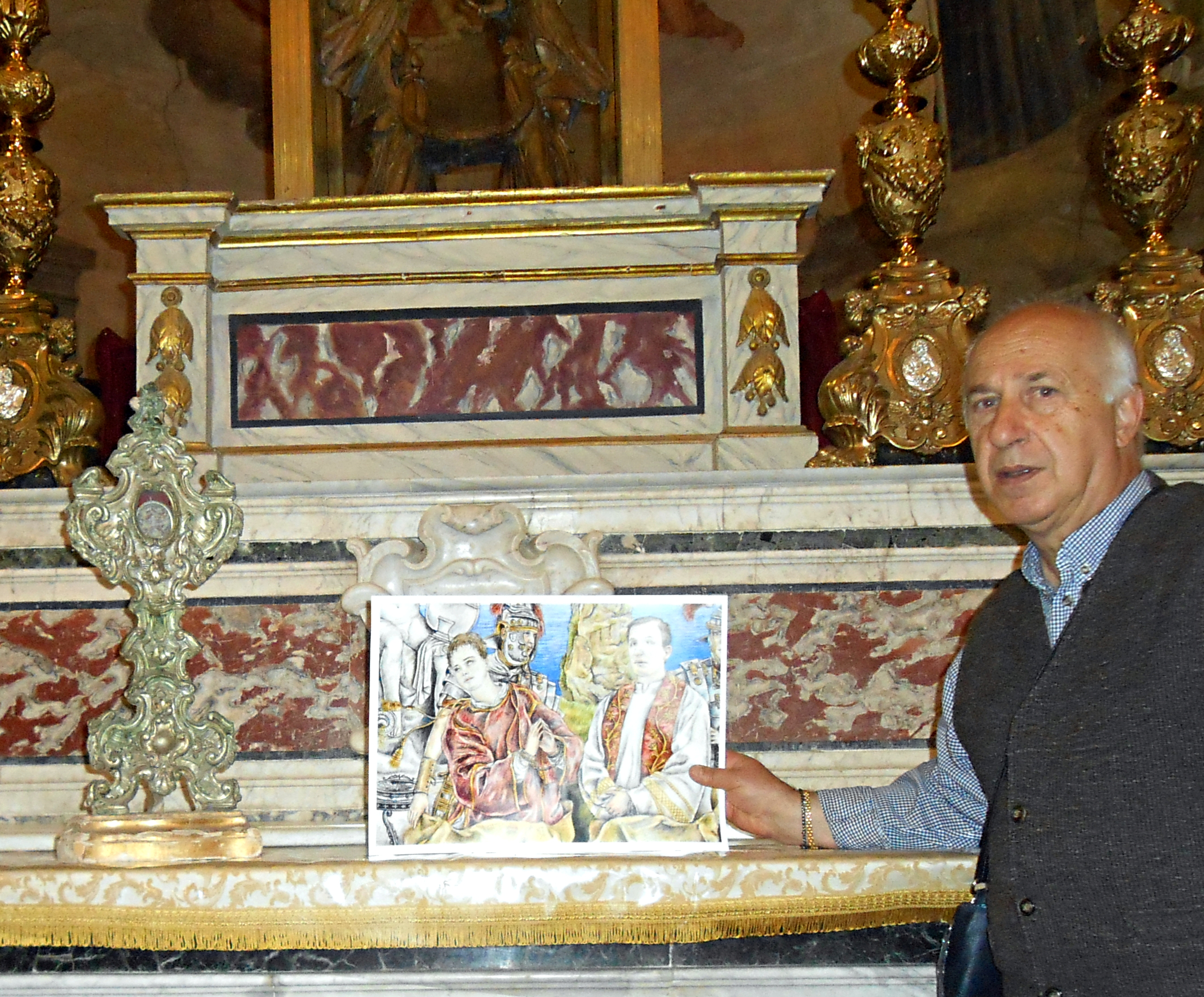 Veroli (Frosinone), Basilica di Sant'Erasmo: il dott. Luciano Trulli accanto al reliquiario argenteo di San Cesario e all'illustrazione "Martirio dei SS. Cesario e Giuliano"